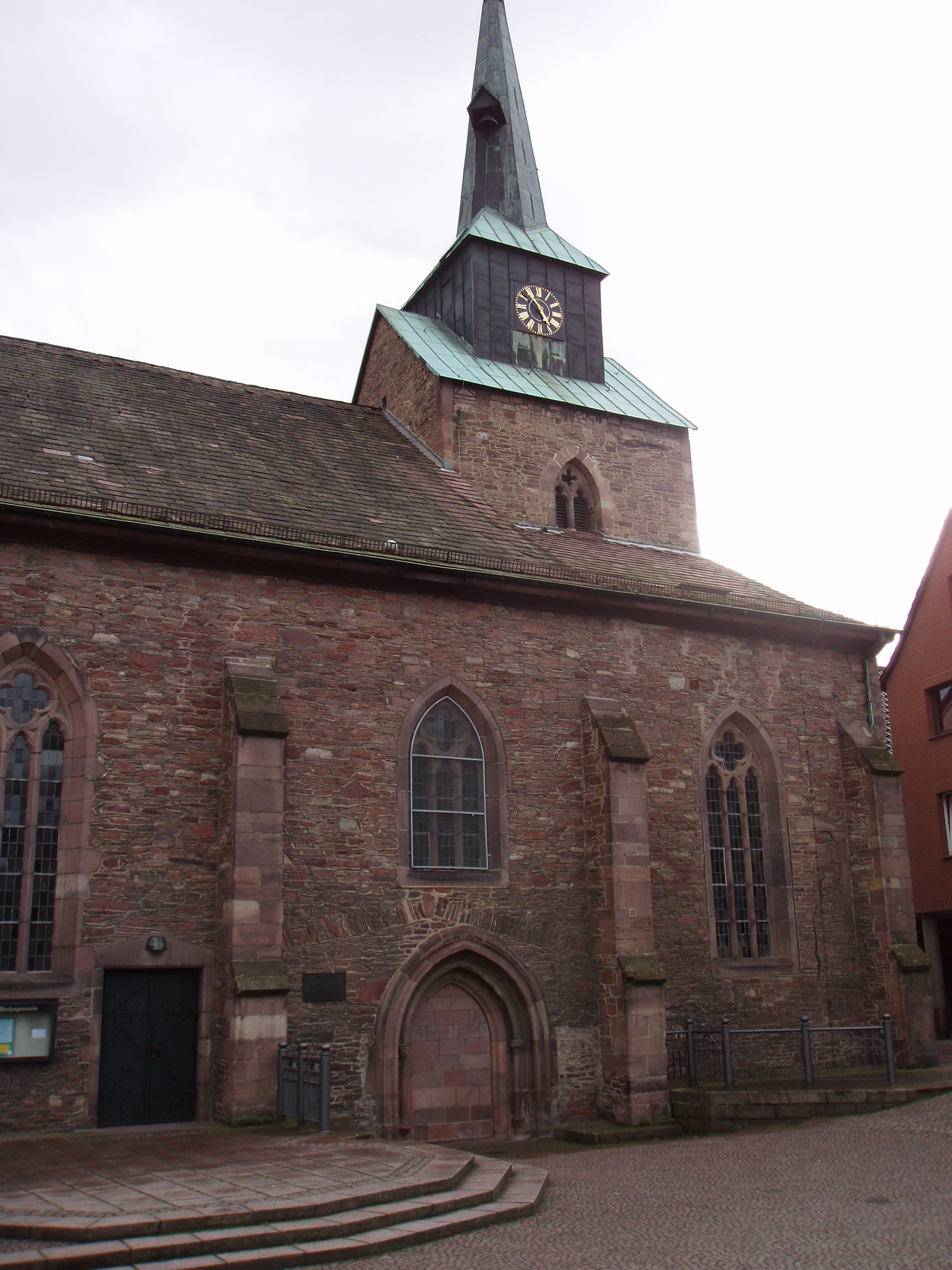 Bodenwerder_Stadtkirche_St._Nikolai.jpg